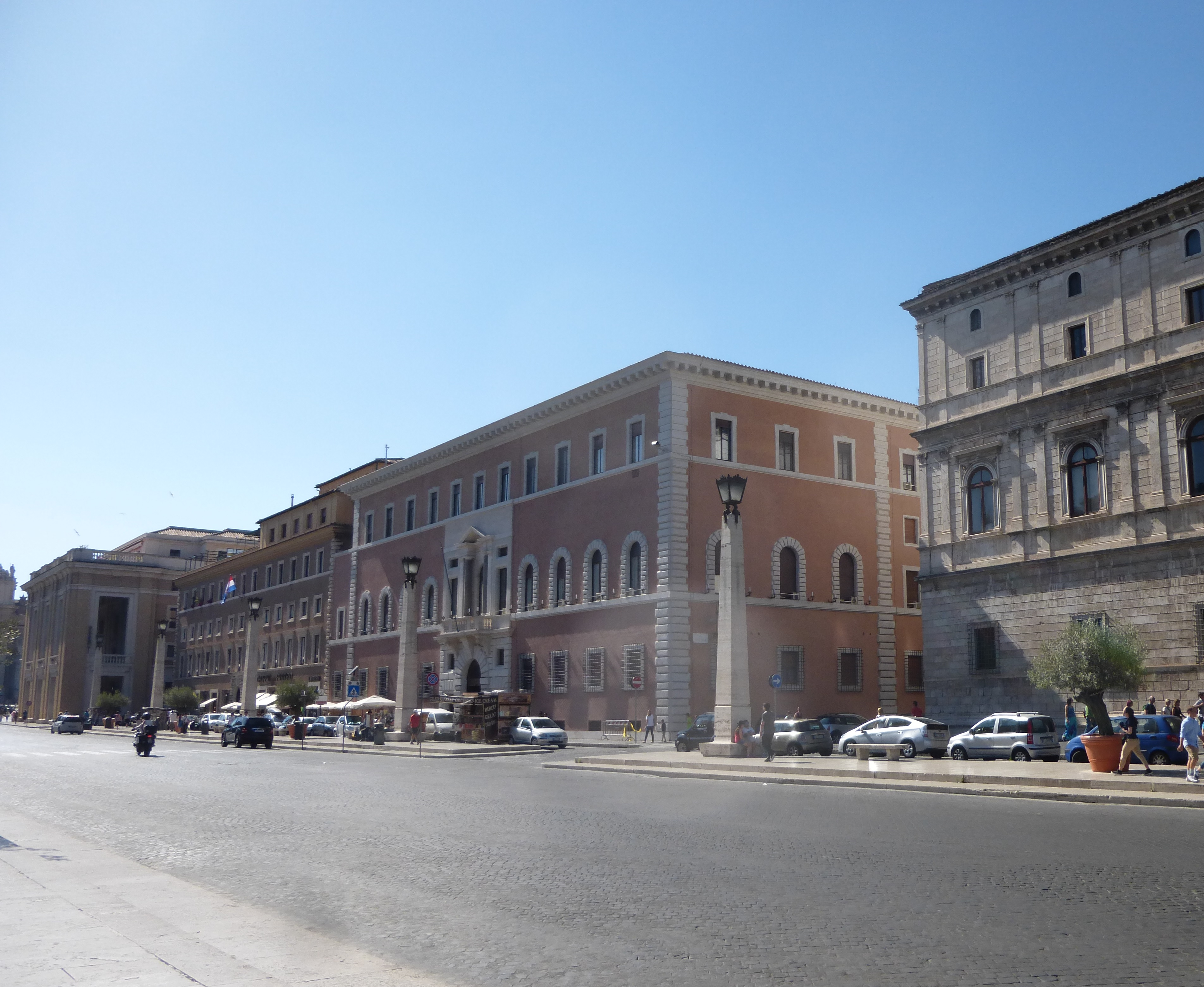 Palazzo dei Convertendi, Rome. [Uitsnede van een werk van Lalupa (